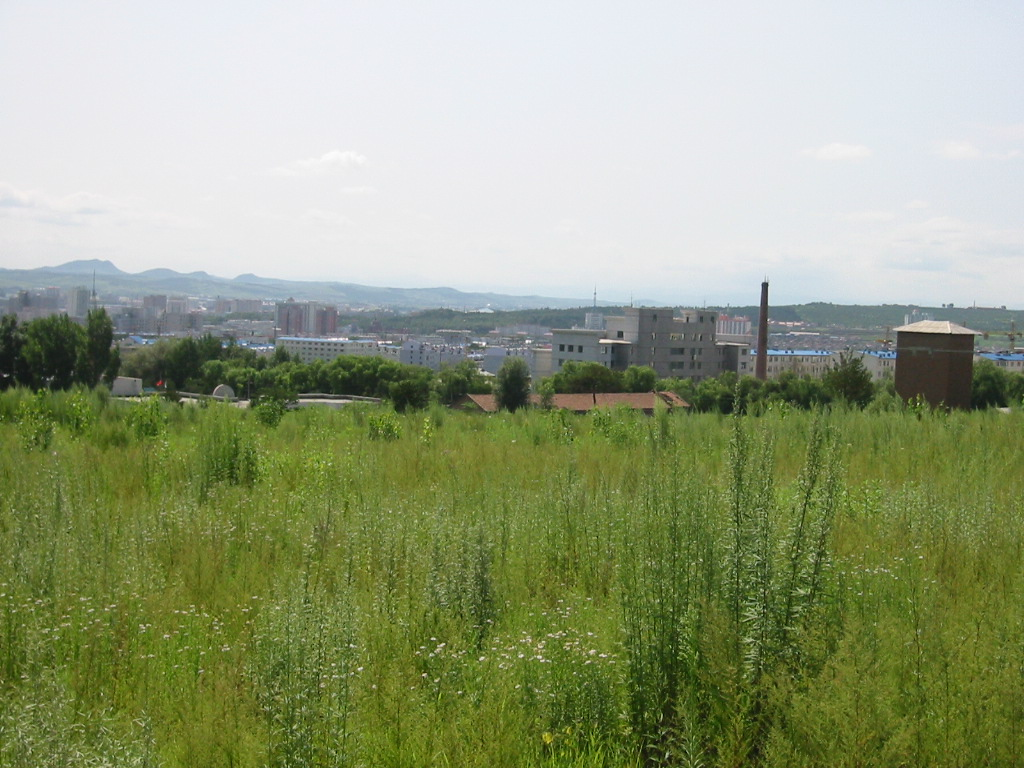 延辺科学技術大学から延吉市街の北部エリアを望む（2005年）